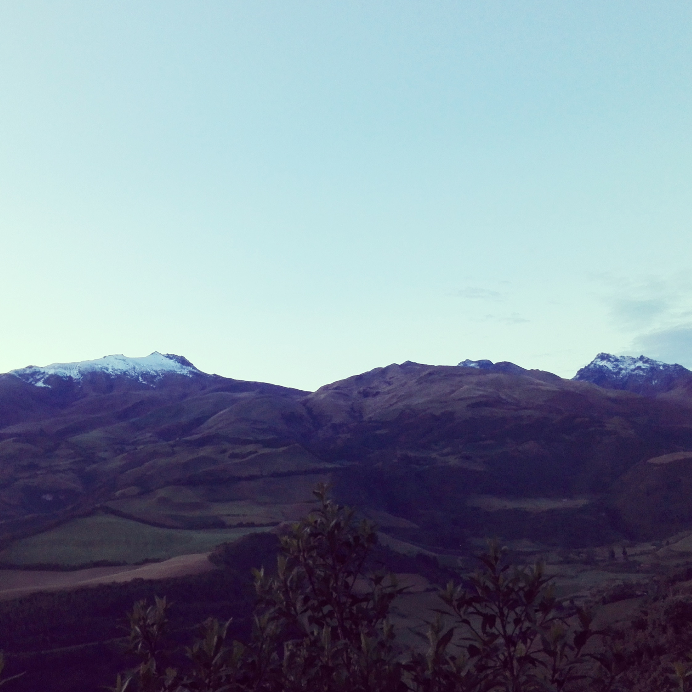 Volcán Pichincha visto desde el sector de huayrapungo posterior a una nevada